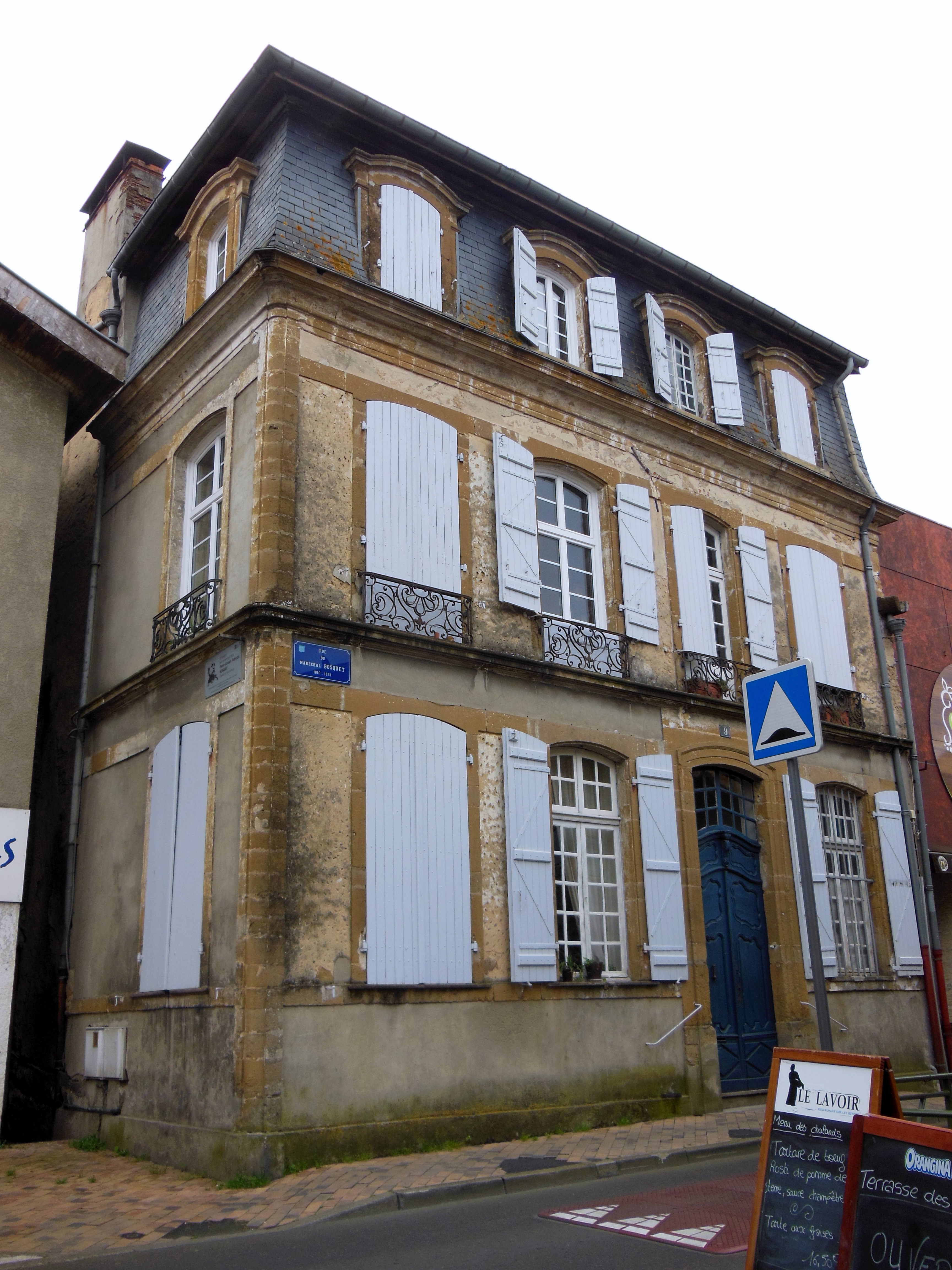 Maison de naissance du Maréchal Bosquet, à Mont-de-Marsan (Landes, France)